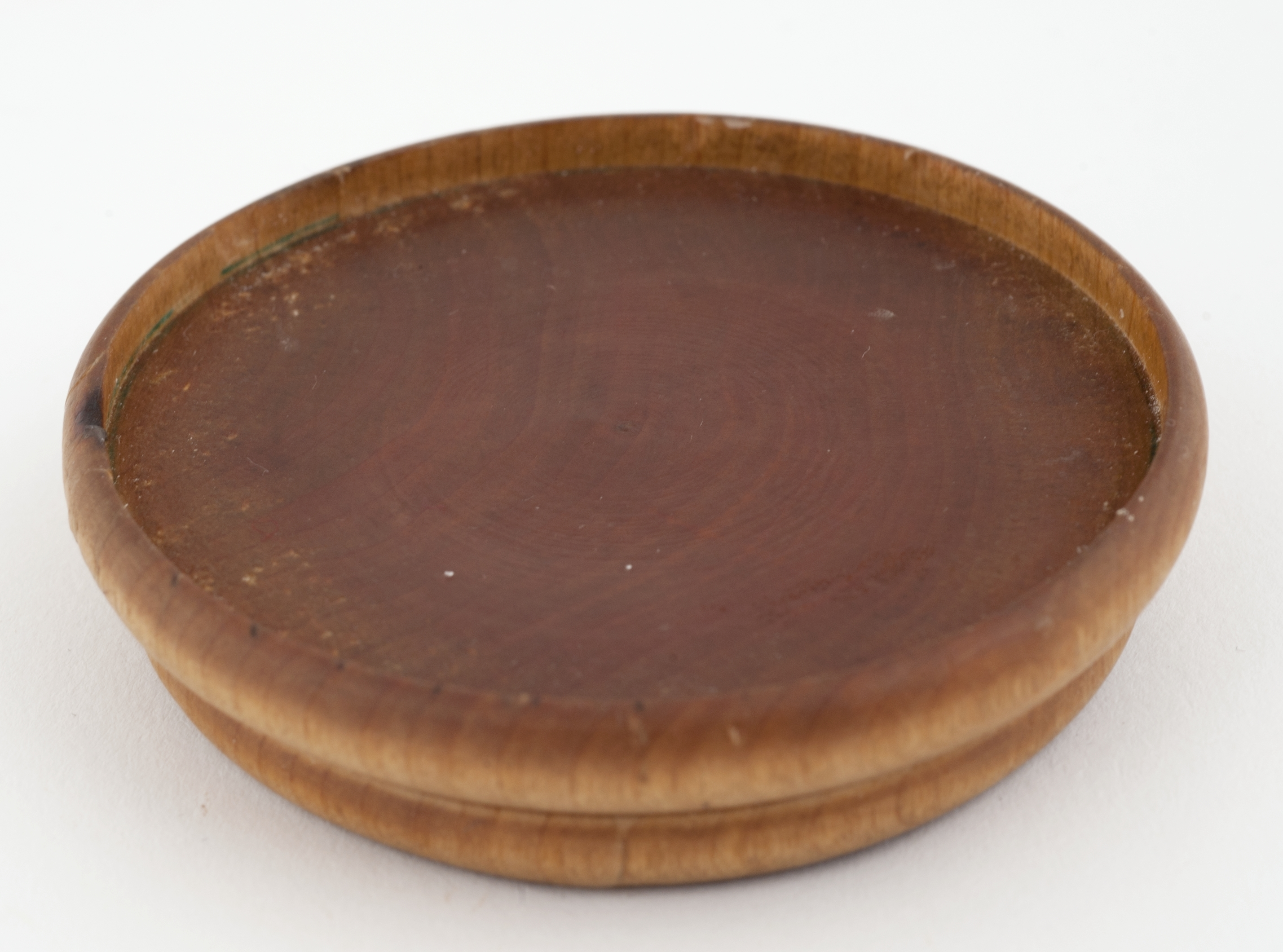 Rotundifikatoren ble brukt ved fremstilling av piller for hånd. Når pillene var ferdig i grovform, ble de gjort fine og trillrunde i en lett puddermasse på et pillebrett ved å trille dem til med rotundifikatoren. Rotundifikatoren er sirkelrund med en liten kant.